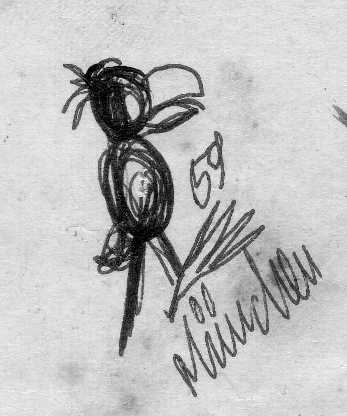 Bildsignatur von Jorge Vazquez Viana